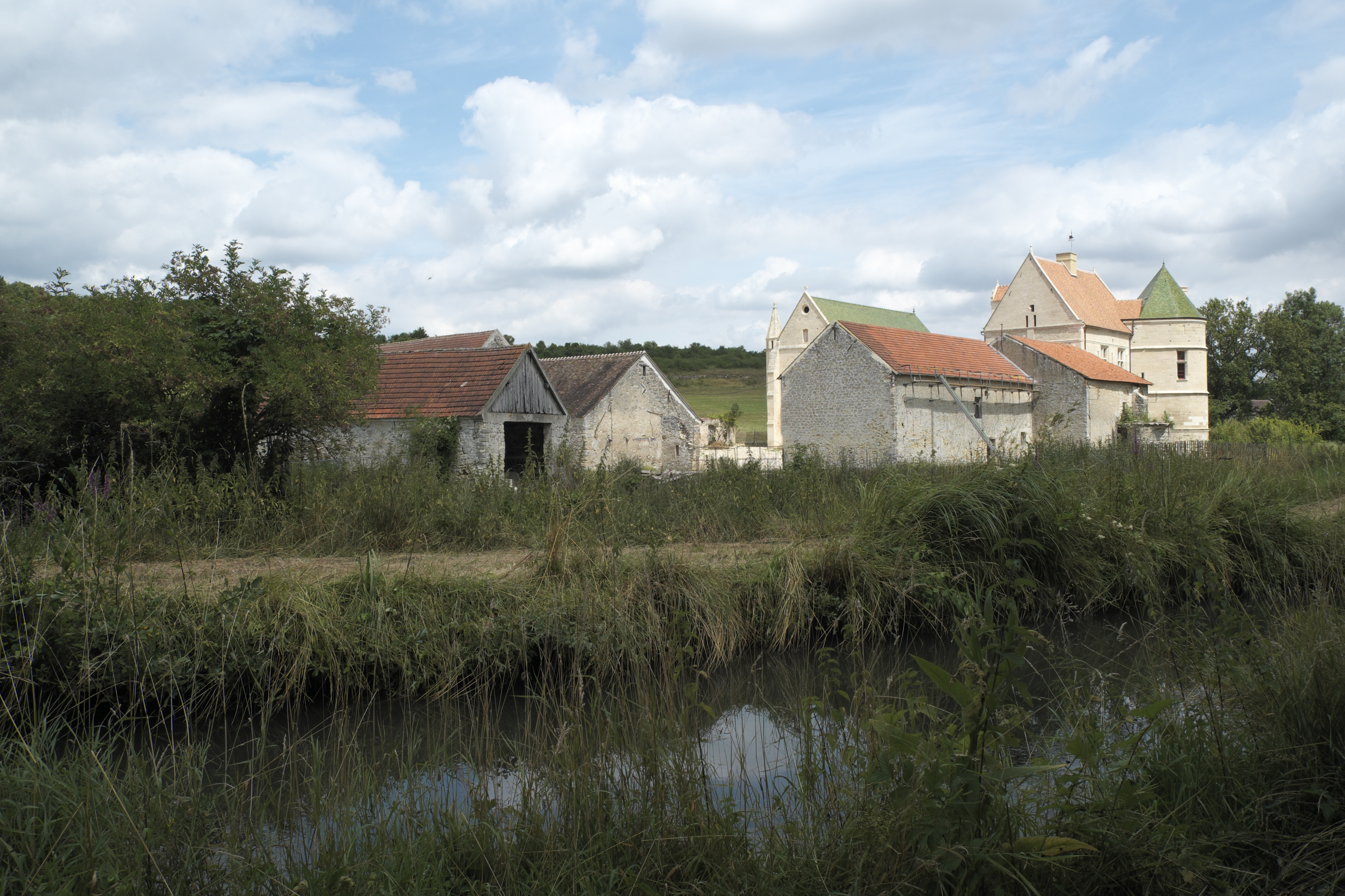 Templerkomturei Moisy-le-Temple in der Gemeinde Montigny-l’Allier im Département Aisne (Region Hauts-de-France/Frankreich), im Vordergrund der Canal du Clignon